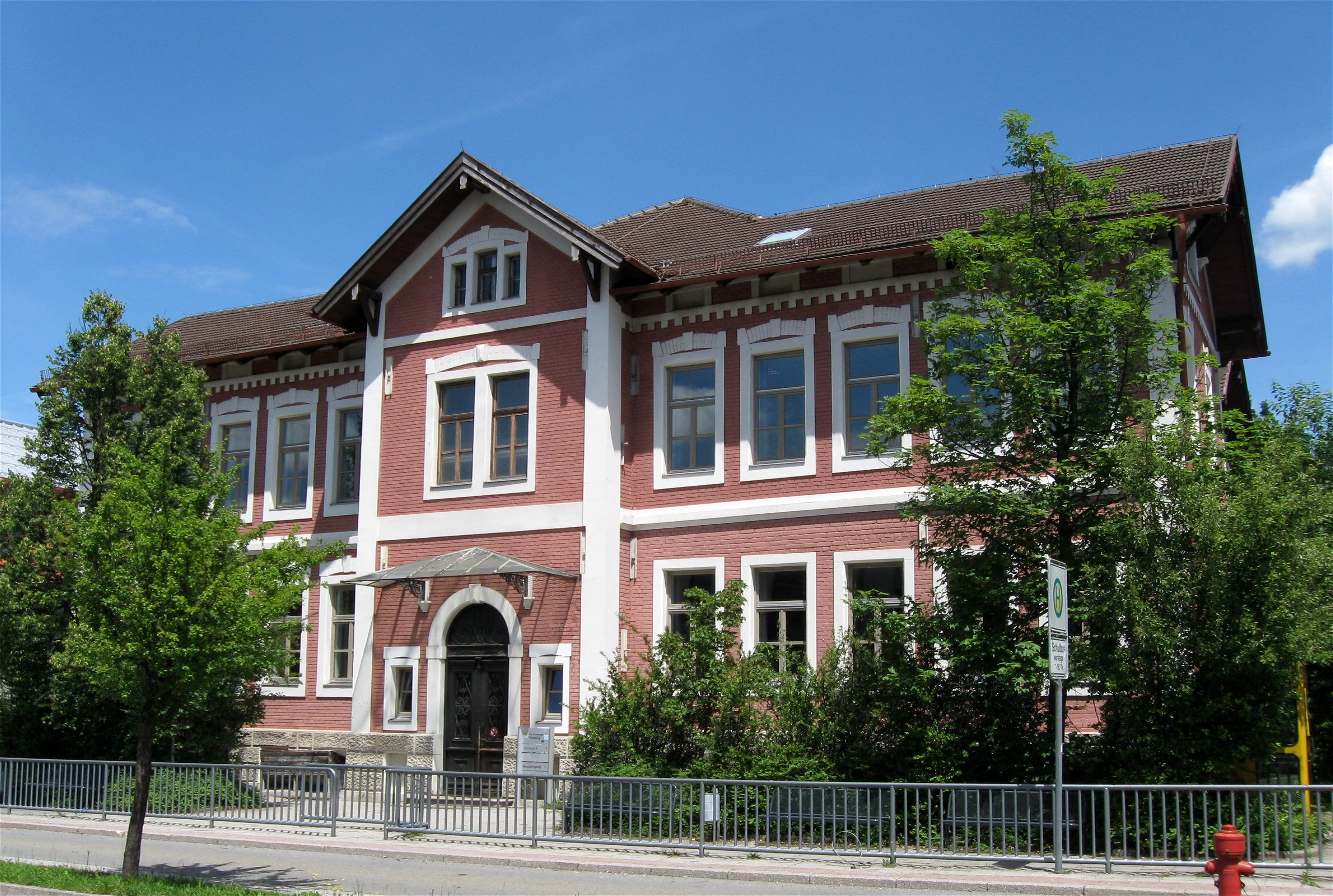 Karlstraße 38. Altes Mädchenschulhaus, Zweiflügelbau, Backstein, mit Lisenengliederungen und Zwerchhaus, 1897 ff.